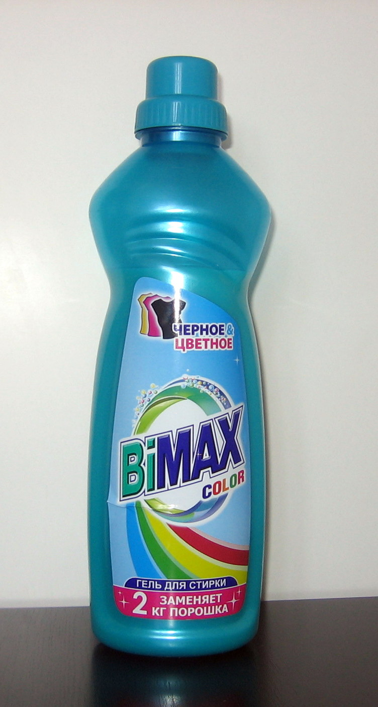 Гель для стирки BiMax Color для черного и цветного 1000г.